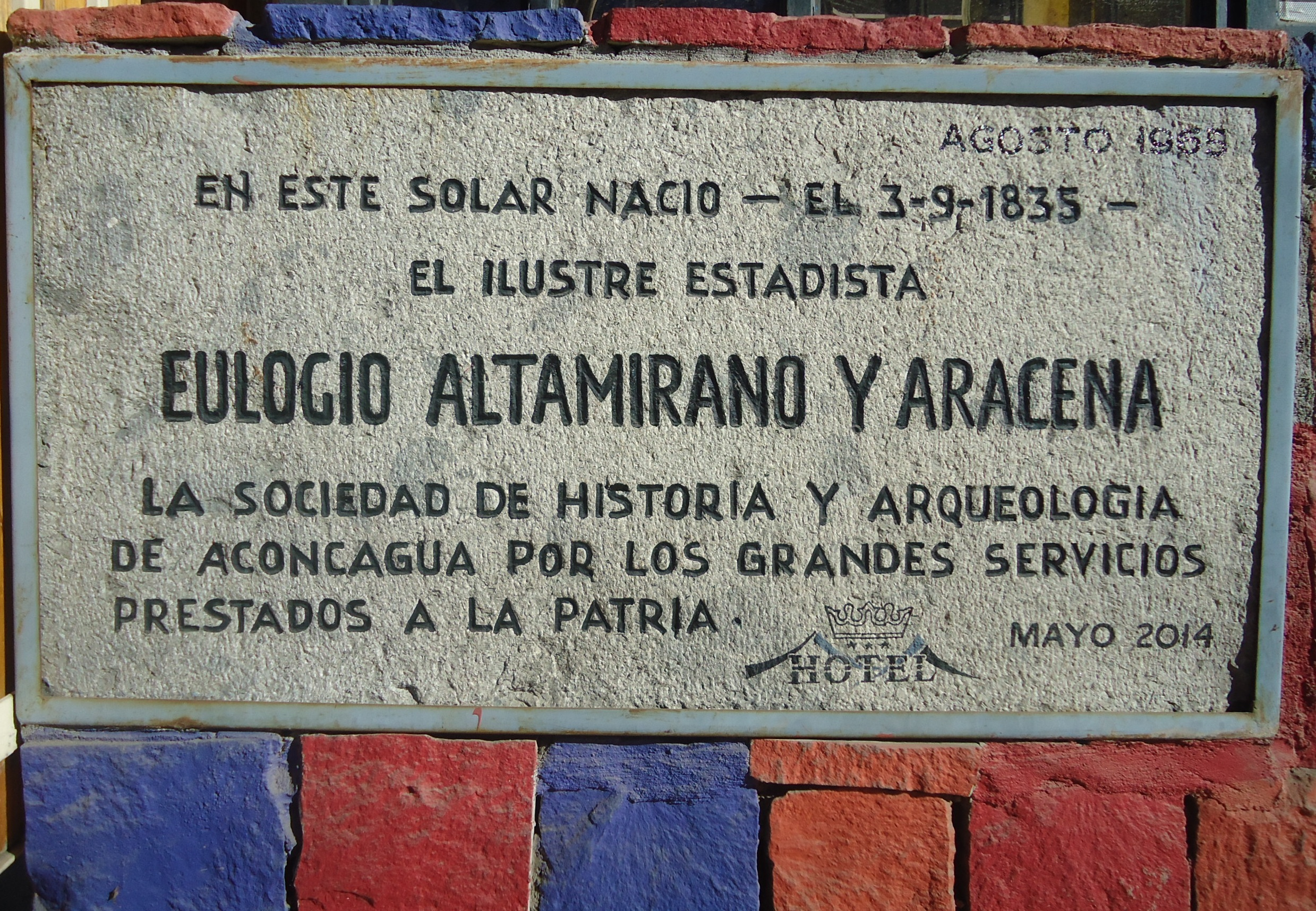 Placa conmemorativa otorgada por la Sociedad de Historia y Arqueologia de Aconcagua